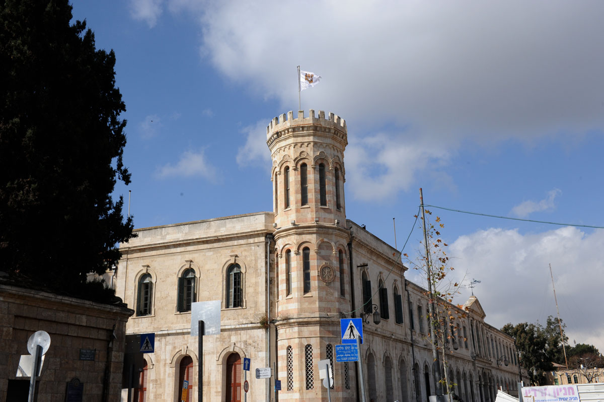 Сергиевское подворье в Иерусалиме. 13 января 2010 г.